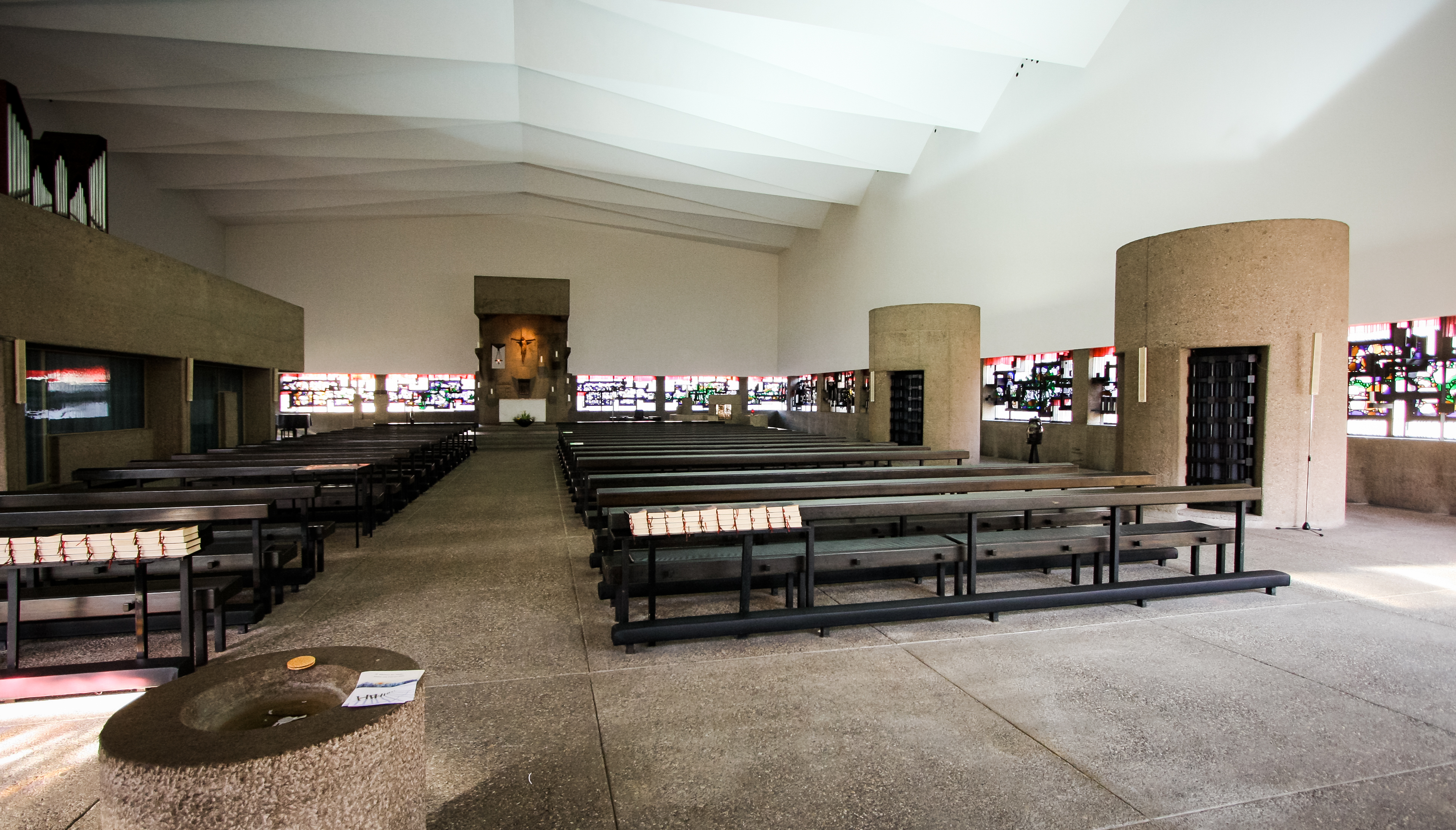 St. Johannes der Täufer, Köln, Architekt: Gottfried Böhm